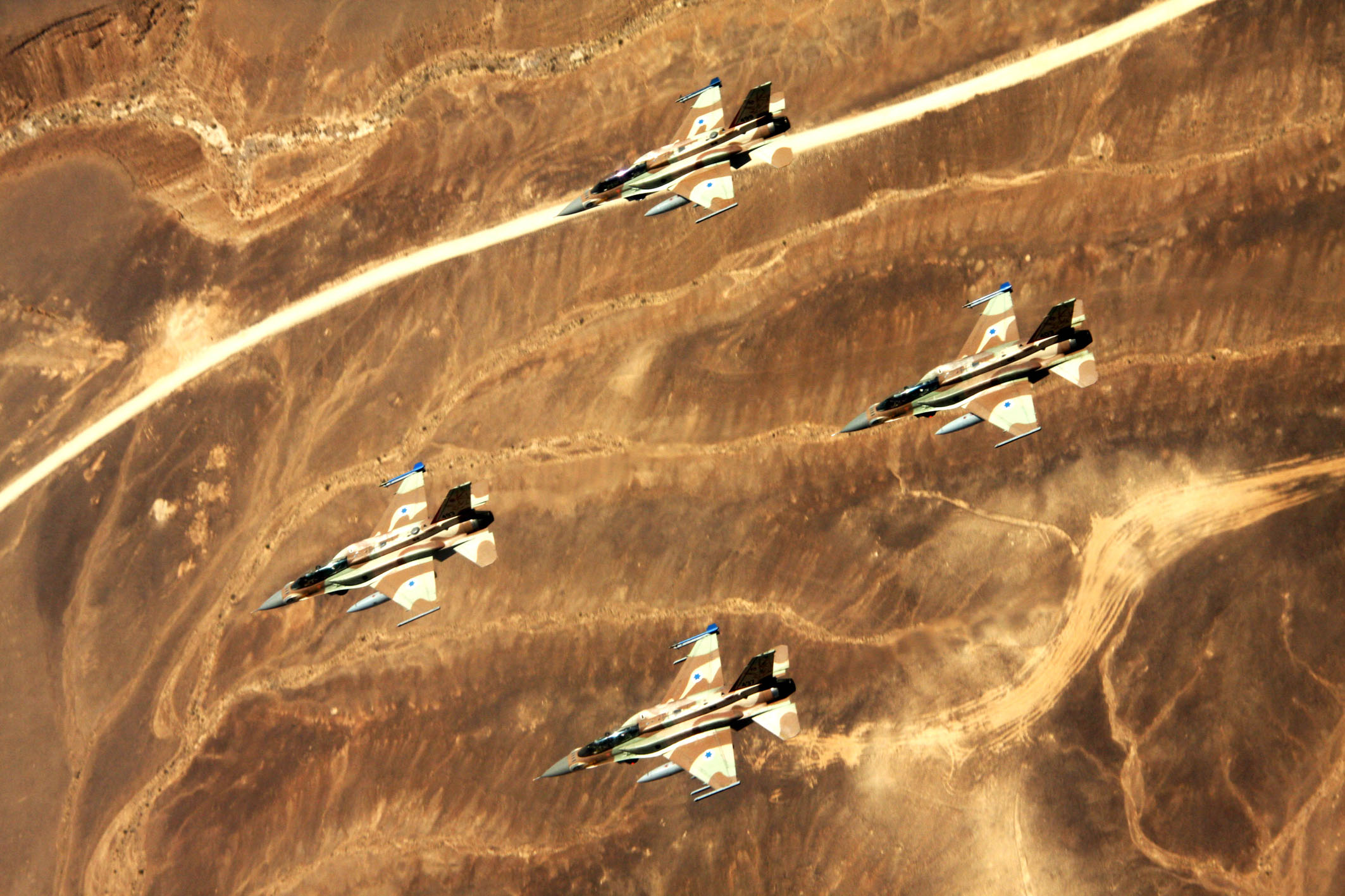 May 10, 2011. The Israeli Air Force crosses all of Israel from north to south, in honor of the country's 63rd Independence Day. Pictured: "Sufa" planes, also known as F-16I, flying in formation. היום ה' באייר תשע"א נערך מטס ההצדעה המסורתי של חיל האוויר בשמי הארץ, לרגל יום העצמאות ה- 63 למדינת ישראל. בתמונות ניתן לראות את מטוסי ה"סופה", F16I, אשר טסים במבנים שונים.